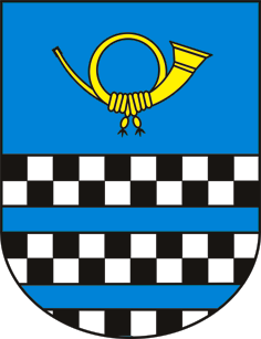 Wappen der Gemeinde Stauchtiz